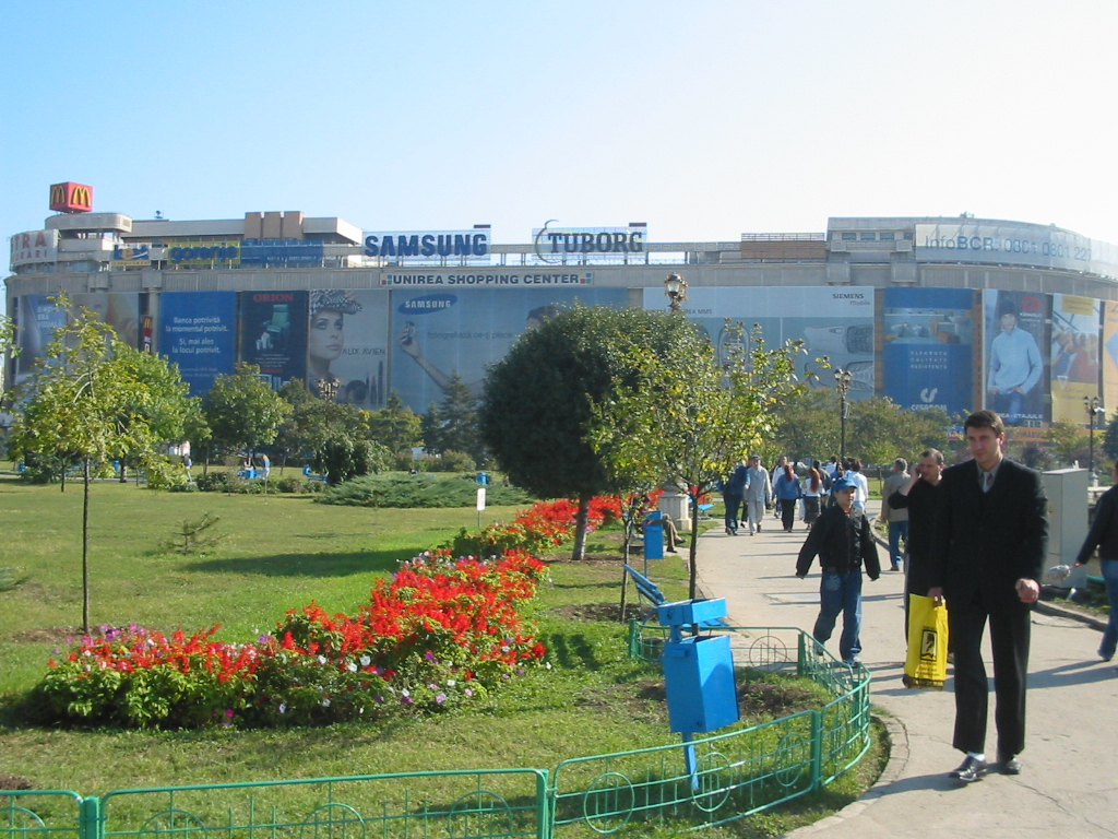 Piaţa Unirii, Bucharest, Romania Photo taken in 2004.